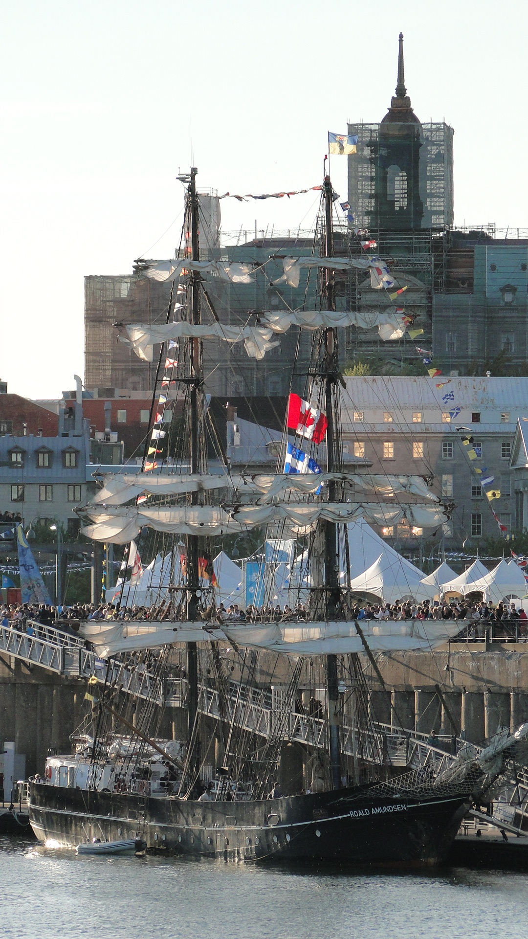 Die Roald Amundsen in Montreal, Kanada